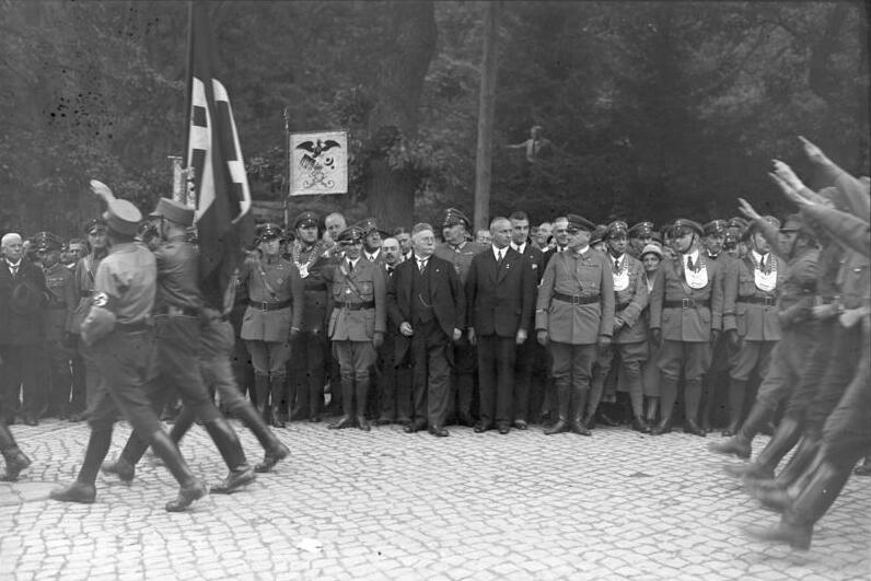 Aufmarsch der nationalen Opposition unter Führung von Hugenberg und Hitler in Bad Harzburg ! Die Führer der nationalen Opposition von links nach rechts: der Bundesführer des Stahlhelms Düsterberg, der Leiter des Stahlhelms Seldte, Geheimrat Hugenberg, dahinter Prinz Eitel Friedrich, beim Vorbeimarsch der Nationalsozialisten in Bad Harzburg.